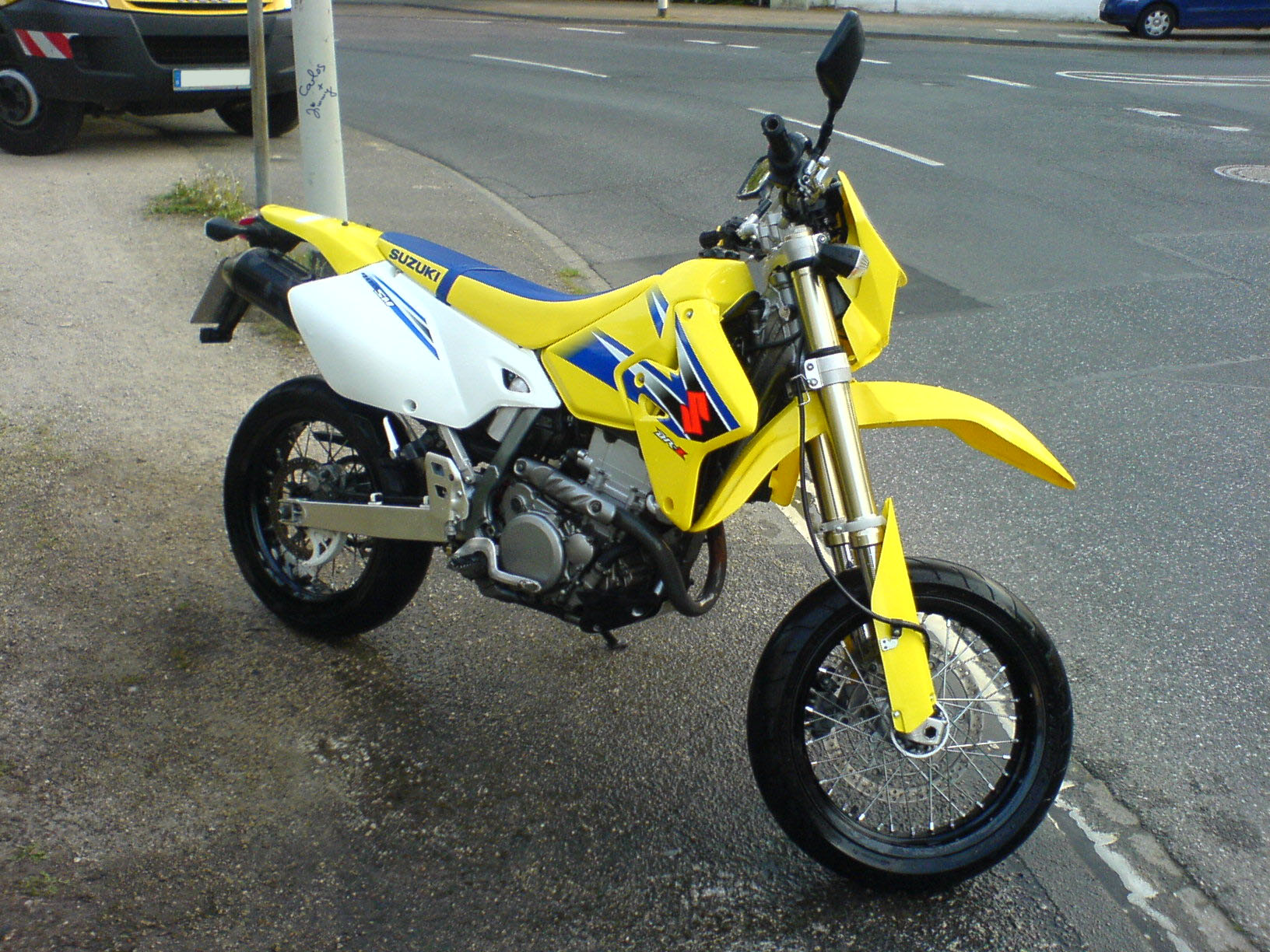 Suzuki DR-Z 400 SM Model 2006 (Supermotovariante der DR-Z in Originalzustand - rechte Seitenansicht)